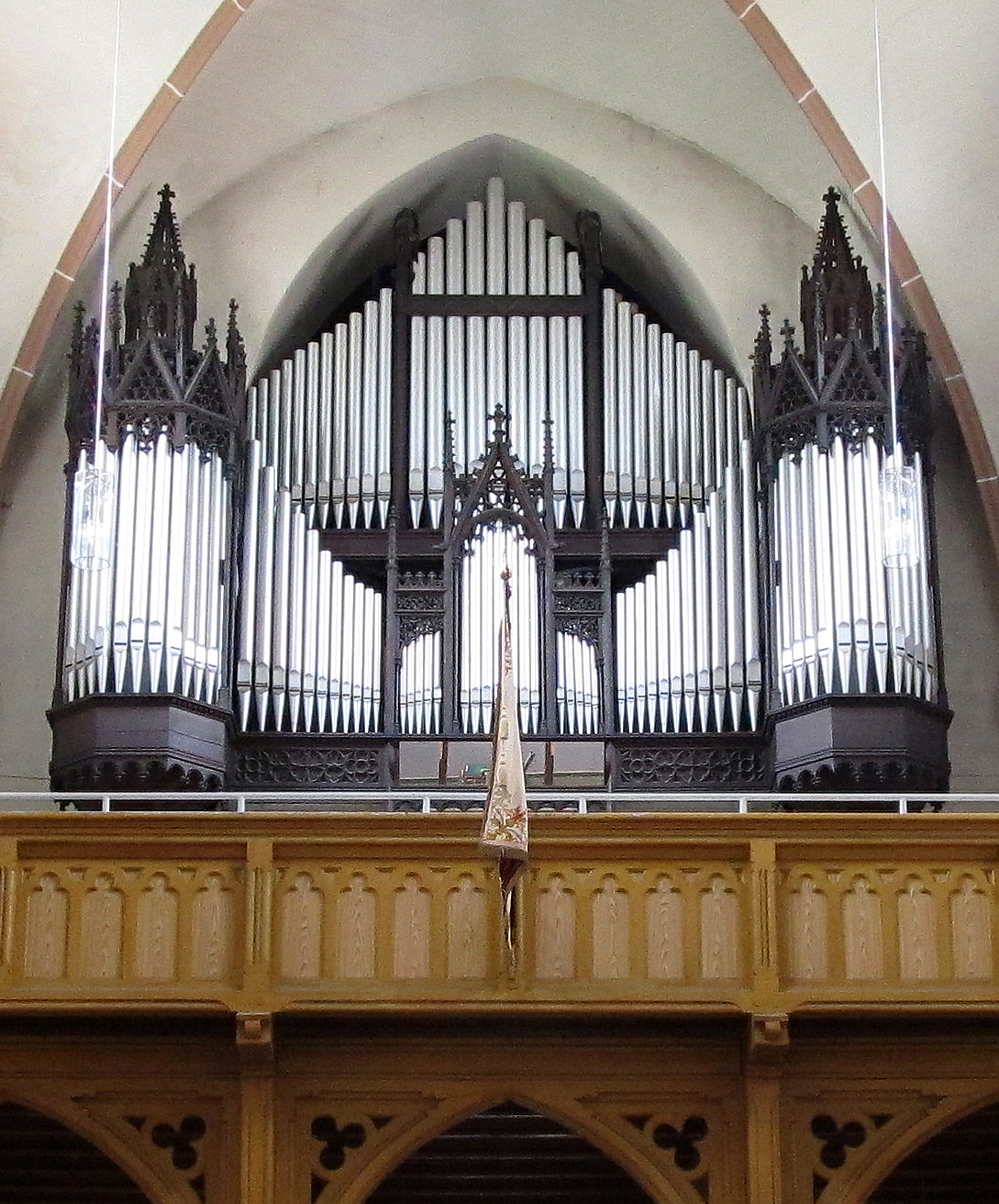 Orgelprospekt der katholischen Pfarrkirche Herz Jesu in Landsweiler-Reden, einem Ortsteil der Gemeinde Schiffweiler, Landkreis Neunkirchen, Saarland